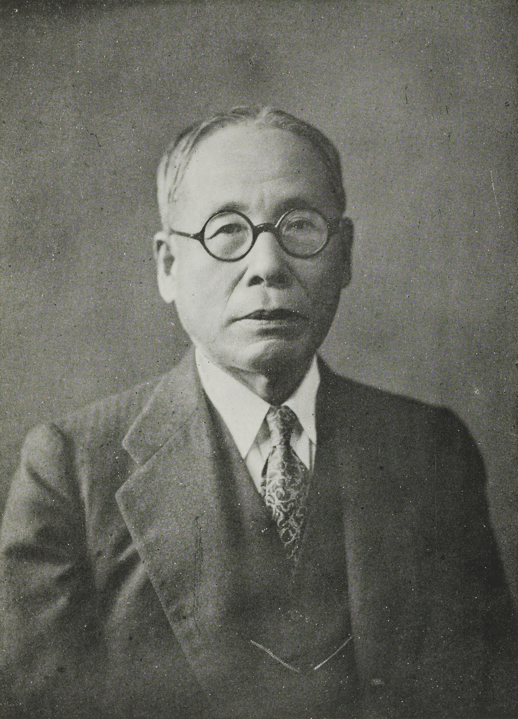 Hachisaburō Hirao (平生釟三郎, 1866–1945)